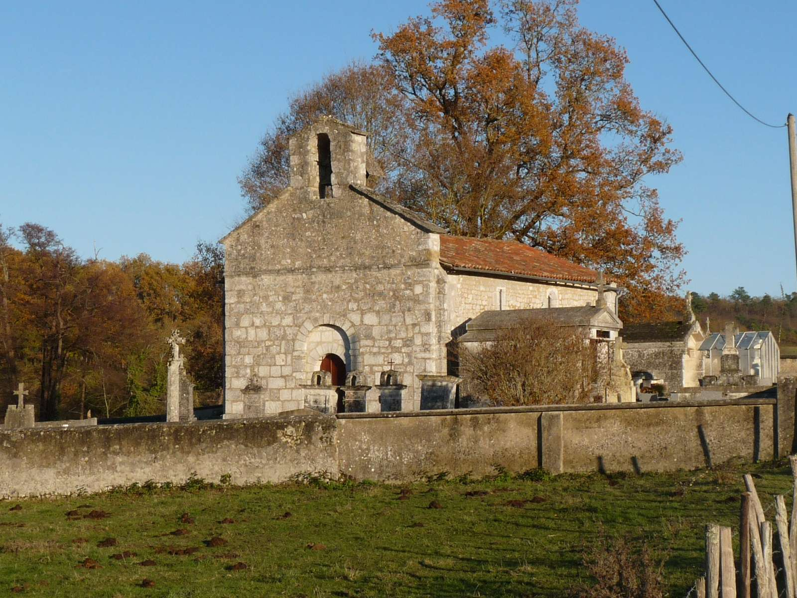 église de St-Genis, Cressac-St-Genis, Charente, France